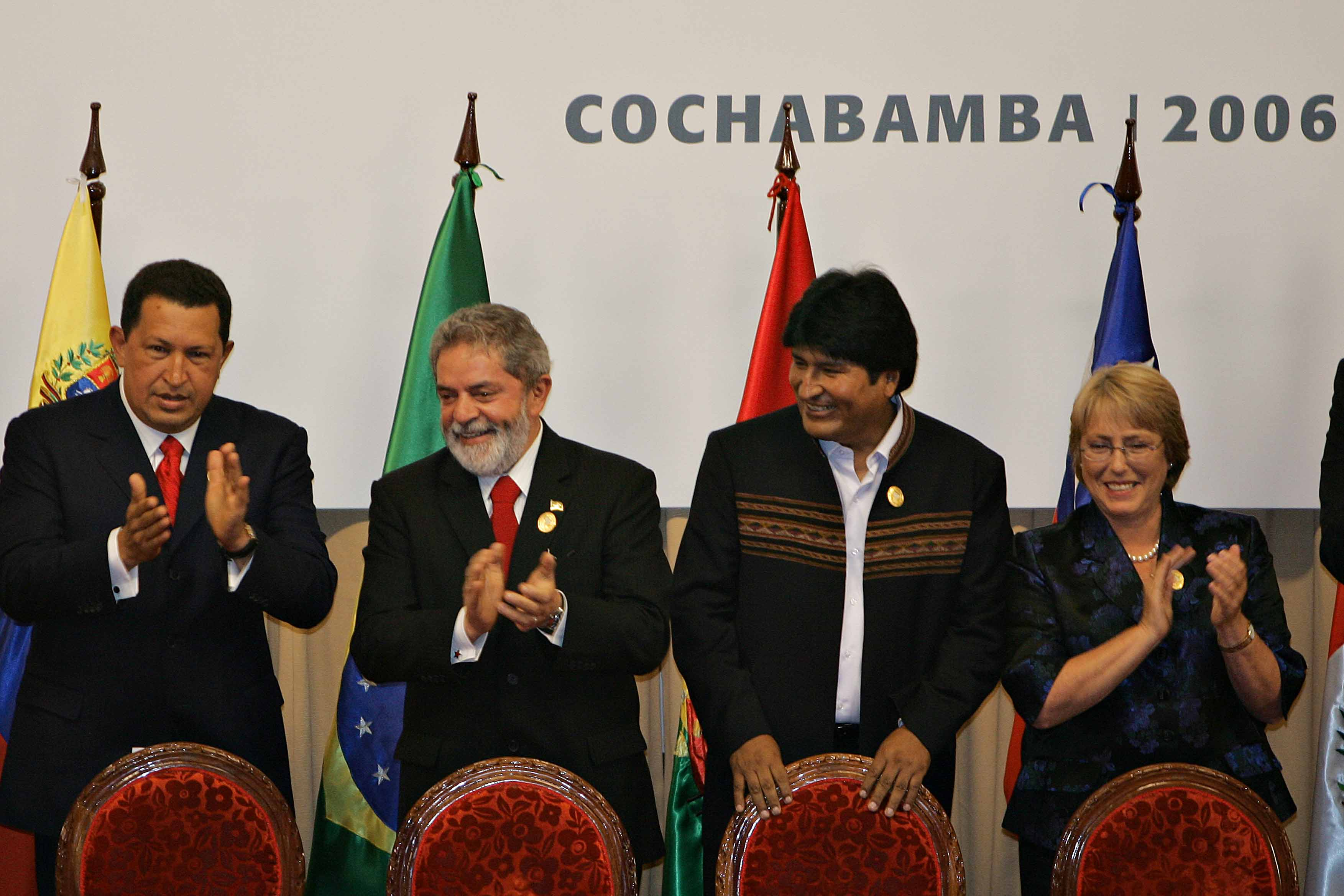 Cochabamba (Bolívia) - O presidente Luiz Inácio Lula da Silva participa da abertura da II Reunião de Chefes de Estado e de Governo dos Países da Comunidade Sul-Americana de Nações (CASA). Ao seu lado, os presidentes da Venezuela, Hugo Chávez, da Bolívia, Evo Morales, e do Chile, Michelle Bachelet.